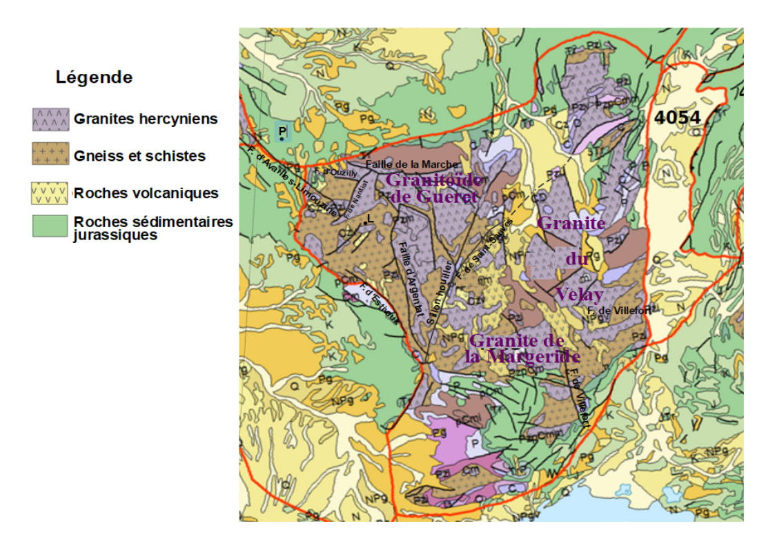 Plus de 100 plutons parsèment le Massif central. Parmi eux, trois provinces granitiques majeures : le granitoïde de Gueret, le granite de la Margeride et le granite du Velay.